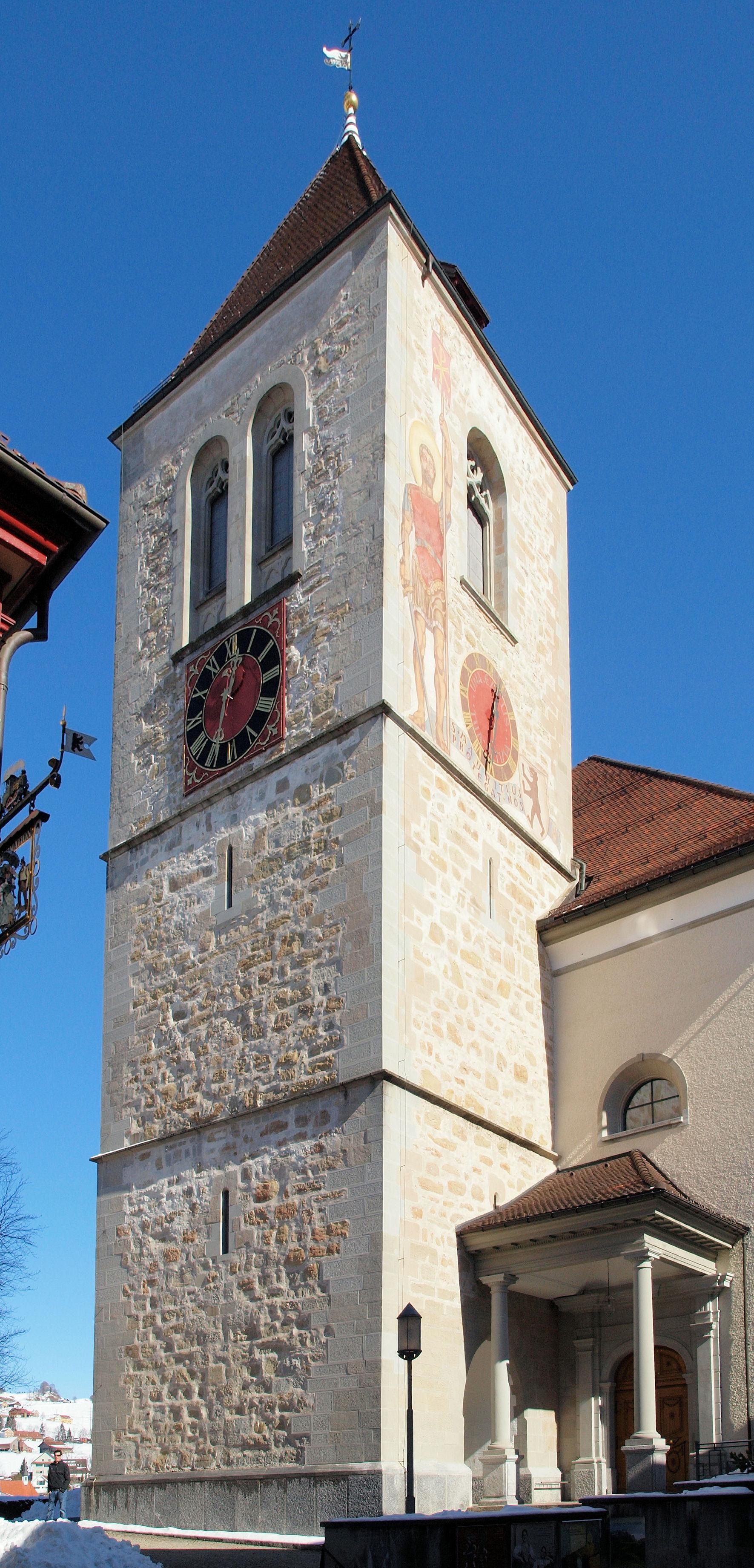 Turm der Pfarrkirche Appenzell. Ansicht aus Südwesten.